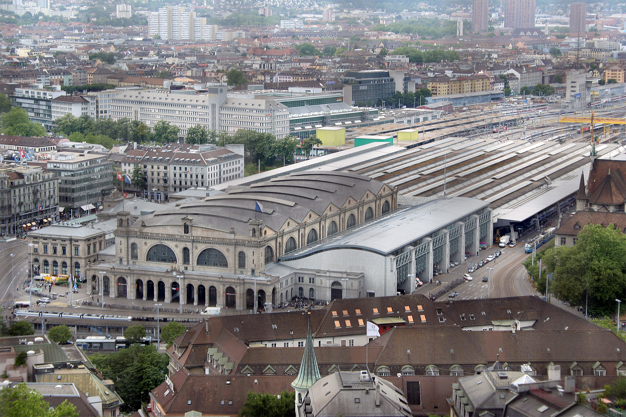 Hauptbahnhof Zürich, Schweiz. Blick durch ein Gitter